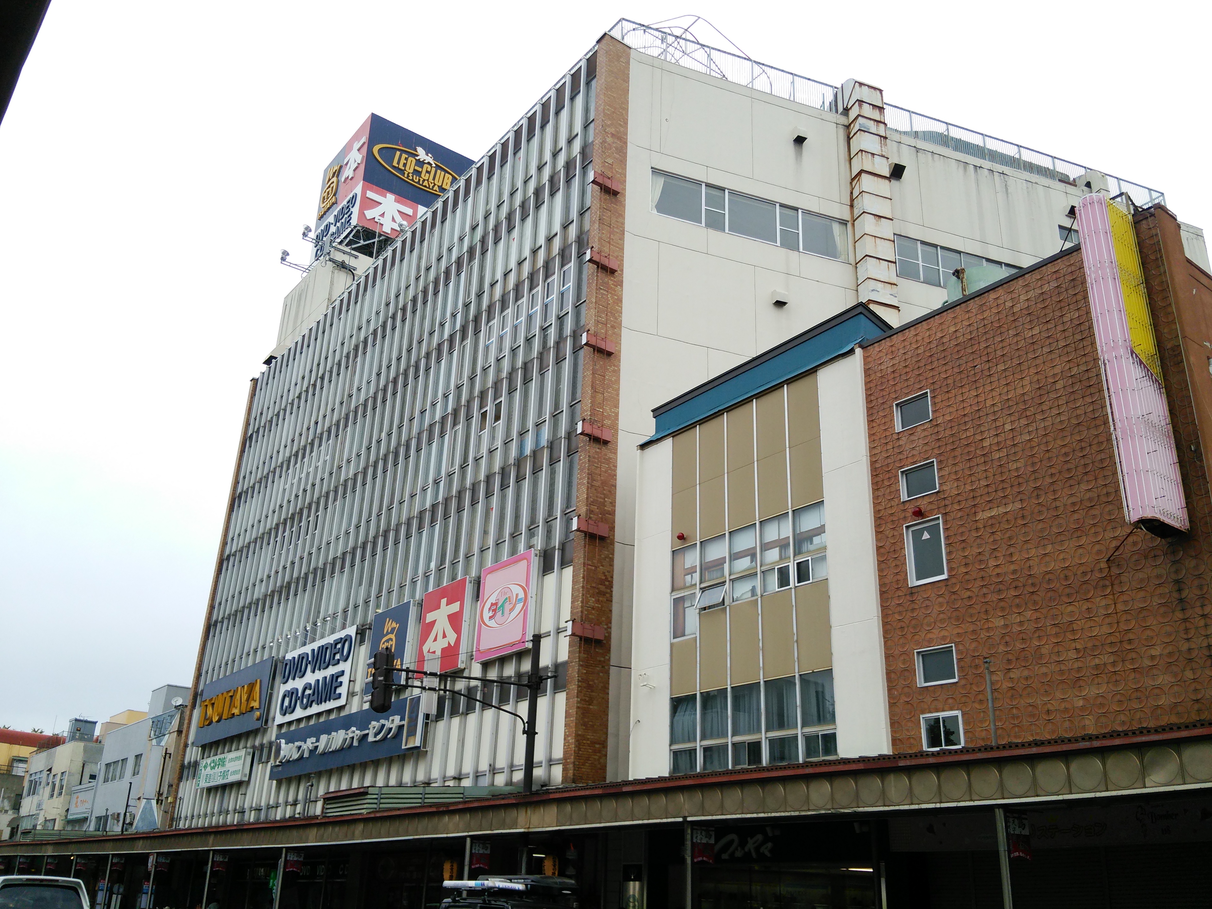 福島県会津若松市栄町、ik06本人が撮影。